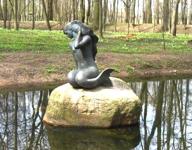 Русалка ў Нясвіжскім парку